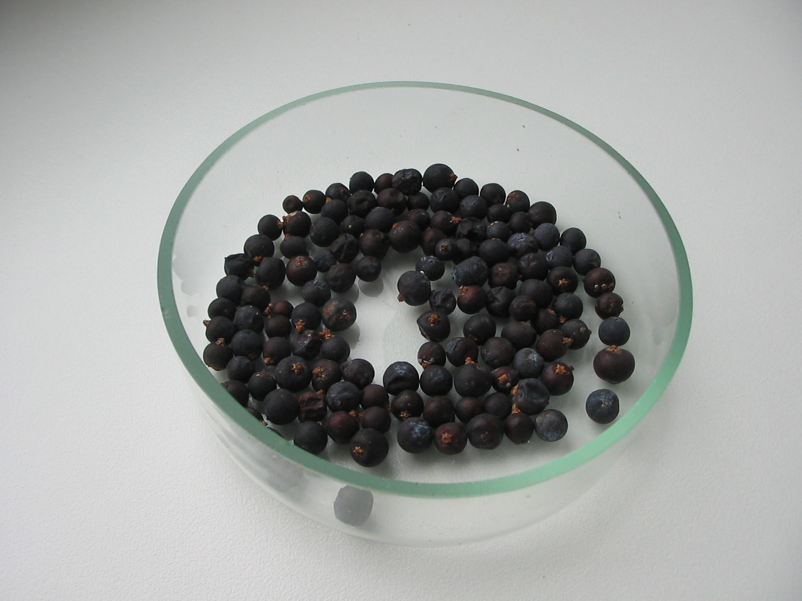 Шишкоягоди ялівцю